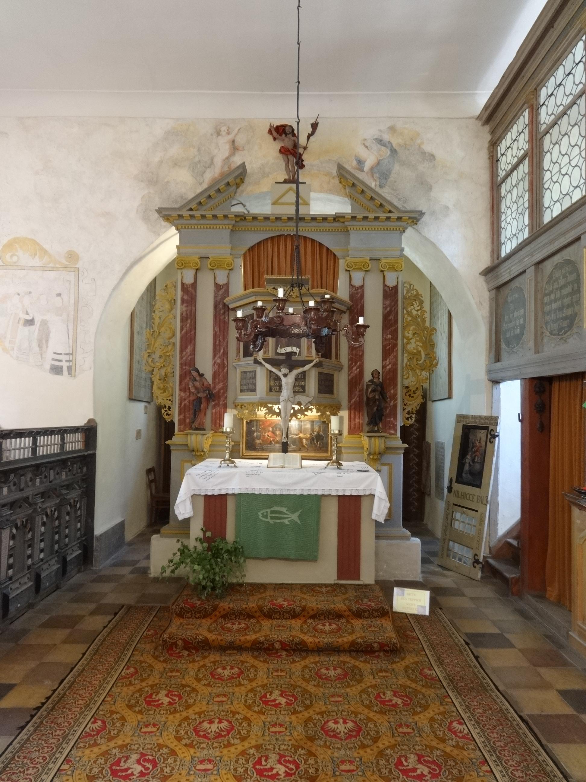 Reichhaltige Ausstattung der Dorfkirche Blankensee, Trebbin, Brandenburg